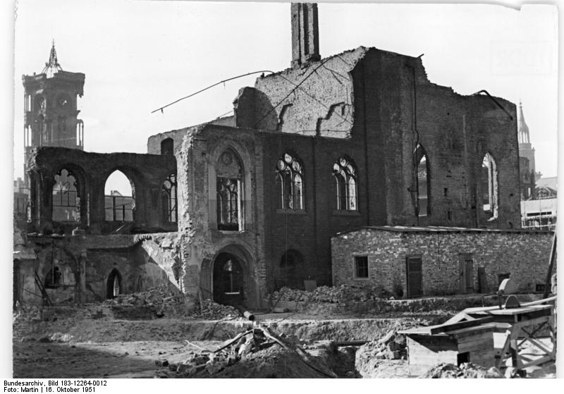 Berlin, "Graues Kloster", Ruine Alte Kulturbauten werden wieder aufgebaut. Viele Kulturbauten, die untrennbar mit der Geschichte Berlins verbunden sind, wurden während des Hitlerkrieges zerstört oder beschädigt. Ausser anderen lebenswichtigen Bauvorhaben des demokratischen Magistrats werden auch diese alten Kulturbauten wieder restauriert und der Nachwelt erhalten. UBz: Das durch anglo-amerikanische Bomber schwer beschädigte "Graue Kloster" wird wieder aufgebaut, die Ruhe der Klosterkirche gesichert und damit vor dem Einsturz bewahrt. Illus Martin 16.10.51